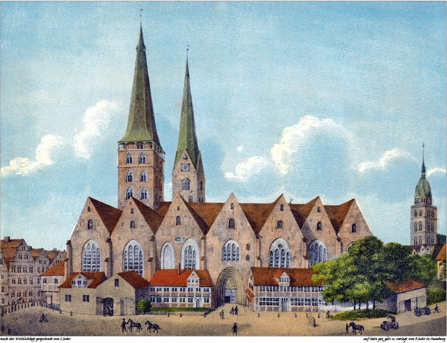 Hamburger Mariendom mit den Türmen der Hauptkirchen St. Petri (2. von links) sowie St. Jacobi (rechts)